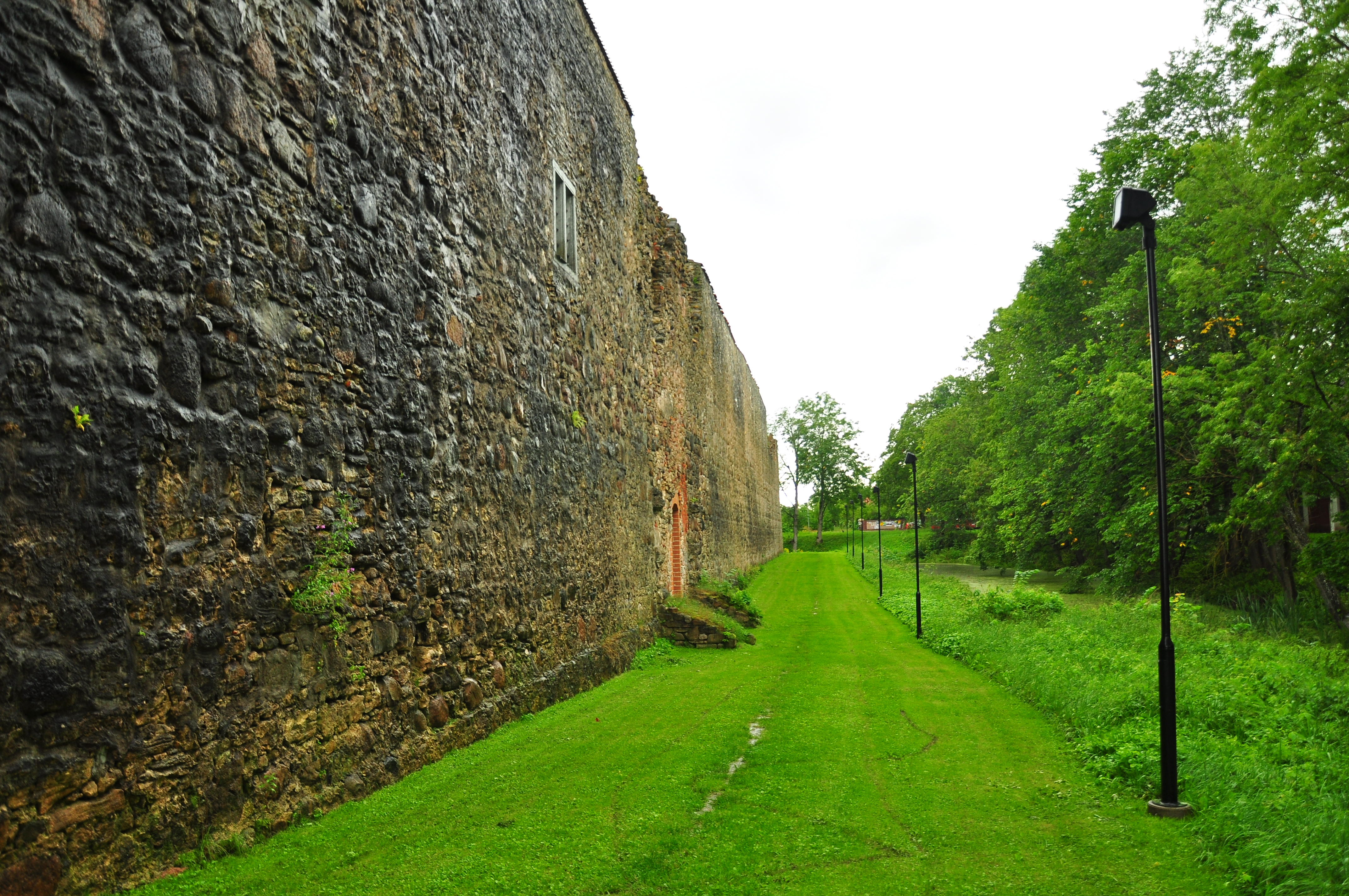 Põltsamaa linnuse varemed vallikraaviga